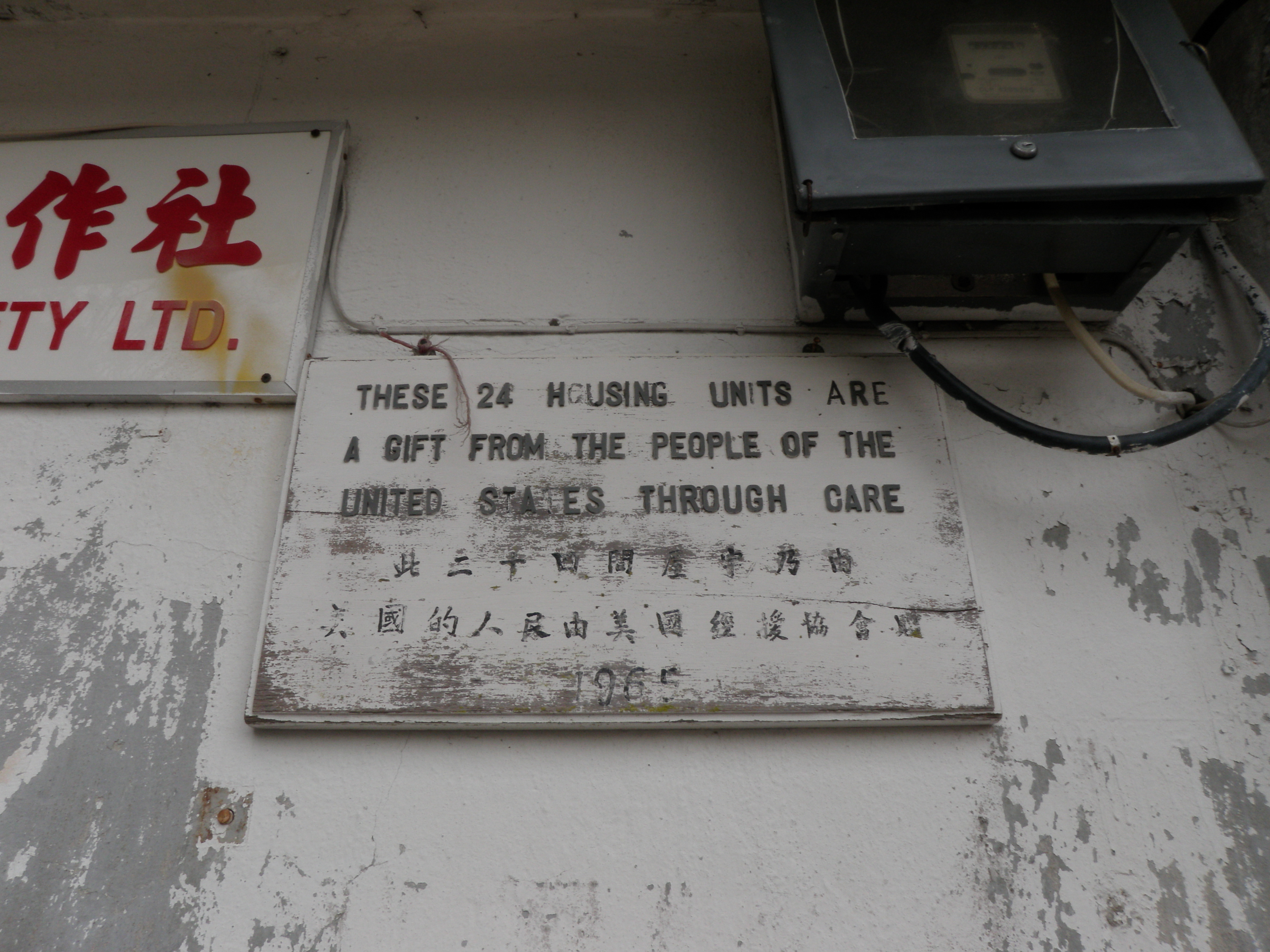 中文（香港）: 紀念牌(合作社外)